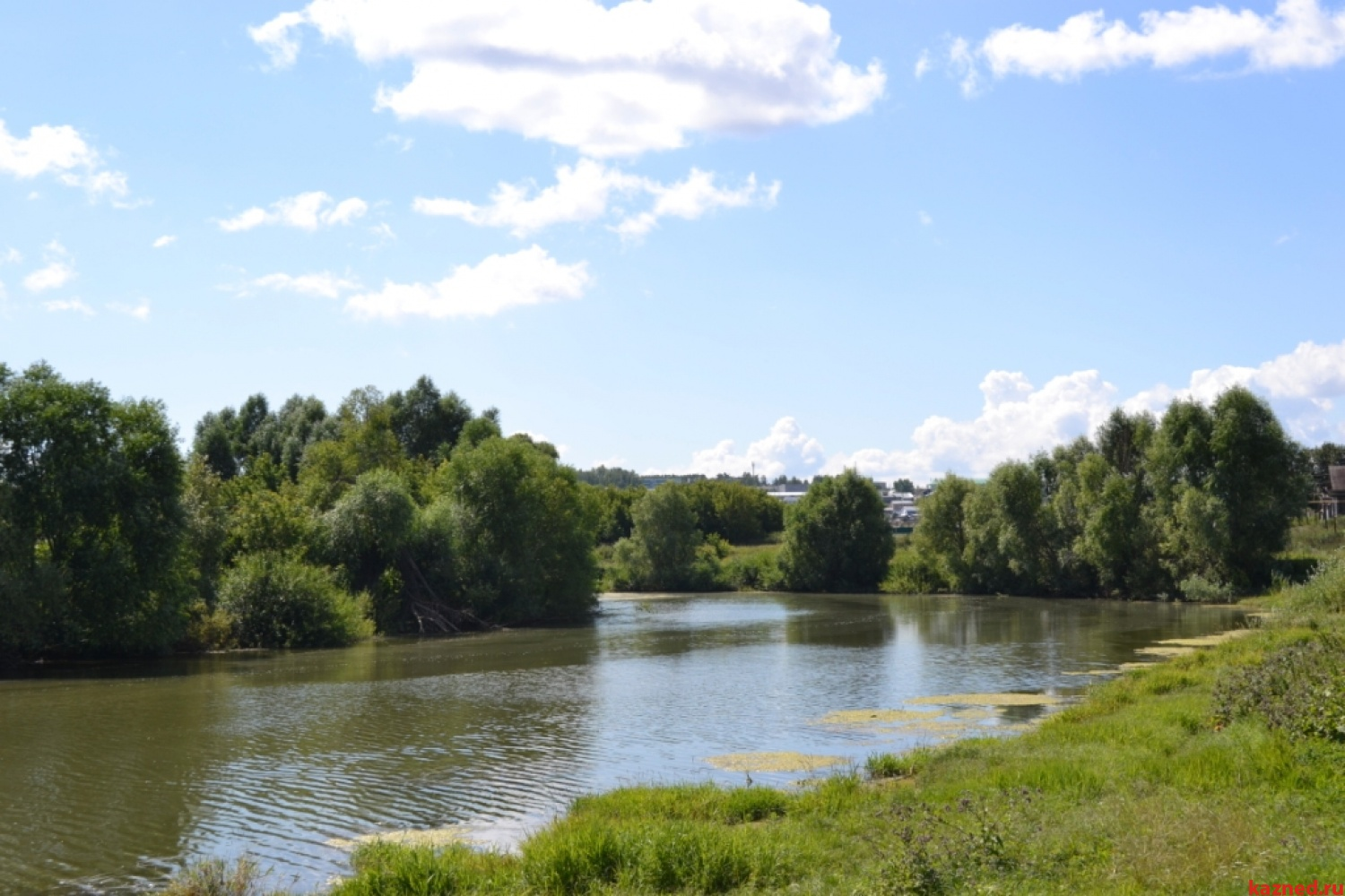 Река Бетька: Рыбно-Слободский район, Татарстан. Прекрасна и летом и зимой. This image is related to the protected area of Russia number 1610156